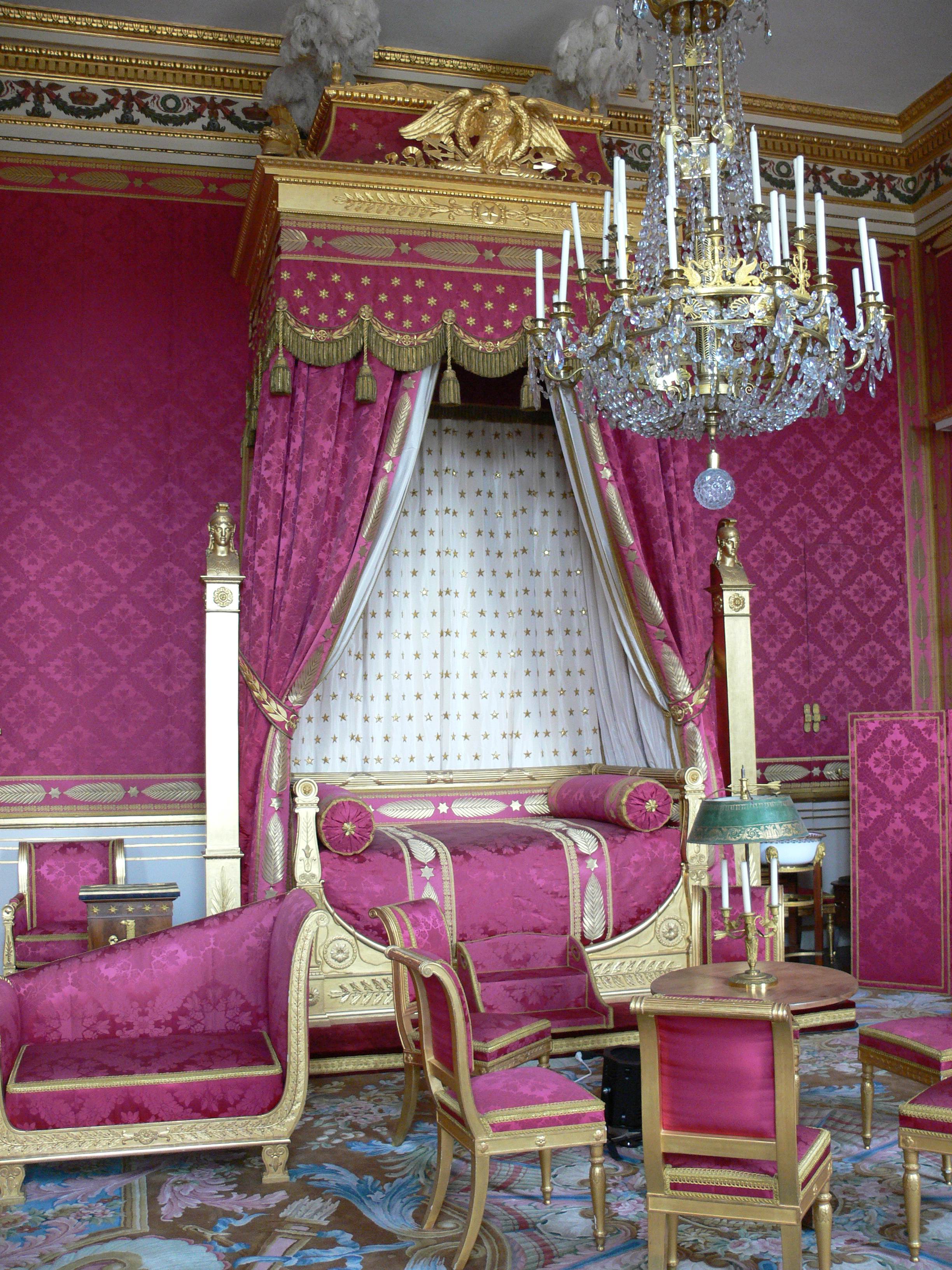 Compiègne, France: Château de Compiègne Les appartements historiques Chambre à coucher de l'empereur Napoléon I Lit de travers en bateau, veilleuse, chaises capitonnées, d'epoque Empire